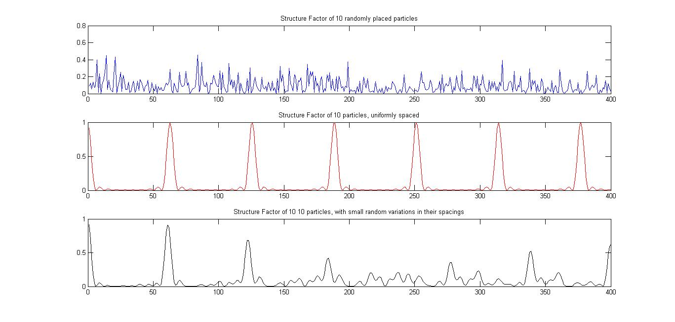 גורם מבנה של מערכת חד מימדית המורכבת עשרה חלקיקים. מלמעלה למטה: בכחול, חלקיקים המפוזרים באופן אקראי. באדום, גביש עם מרווח קבוע בין 2 שכנים קרובים. בשחור, גביש אשר בו המרווח בין כל שני שכנים קרובים מתפלג בצורה אחידה בטווח ערכים קטן.